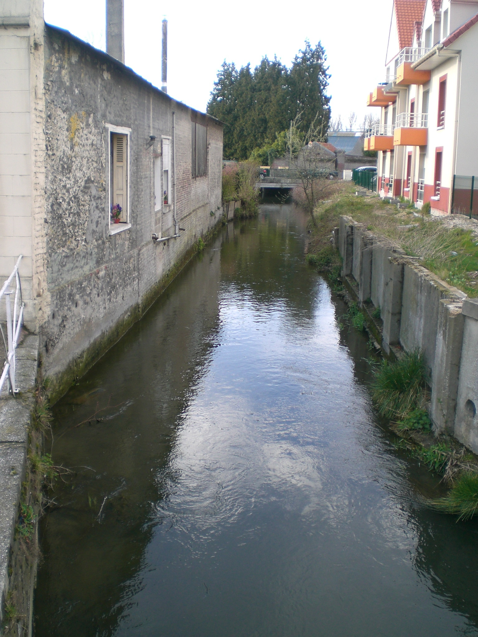 La Maye à l'entrée de Rue côté Gare SNCF